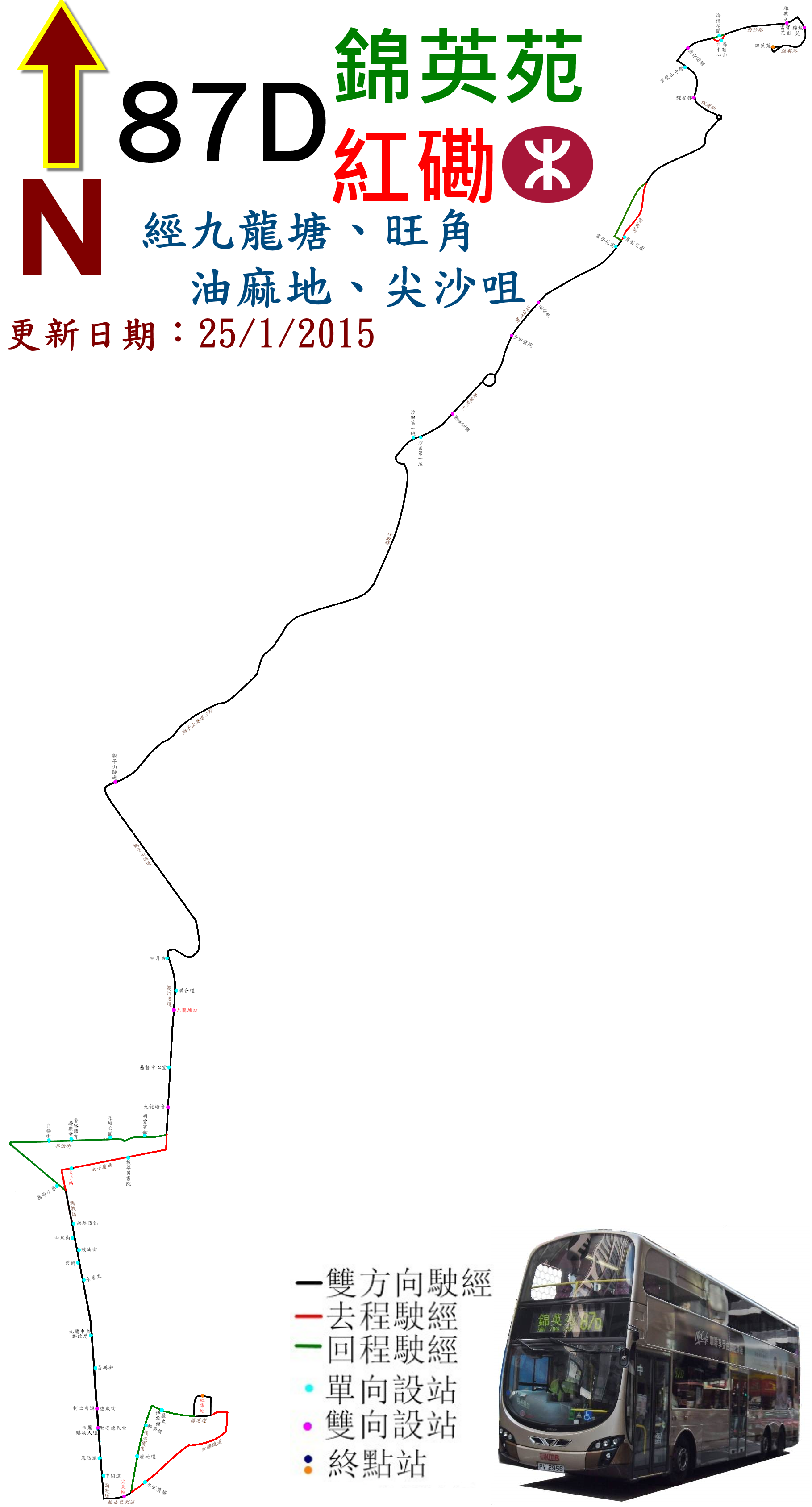 中文（香港）: 九巴87D線的走線圖